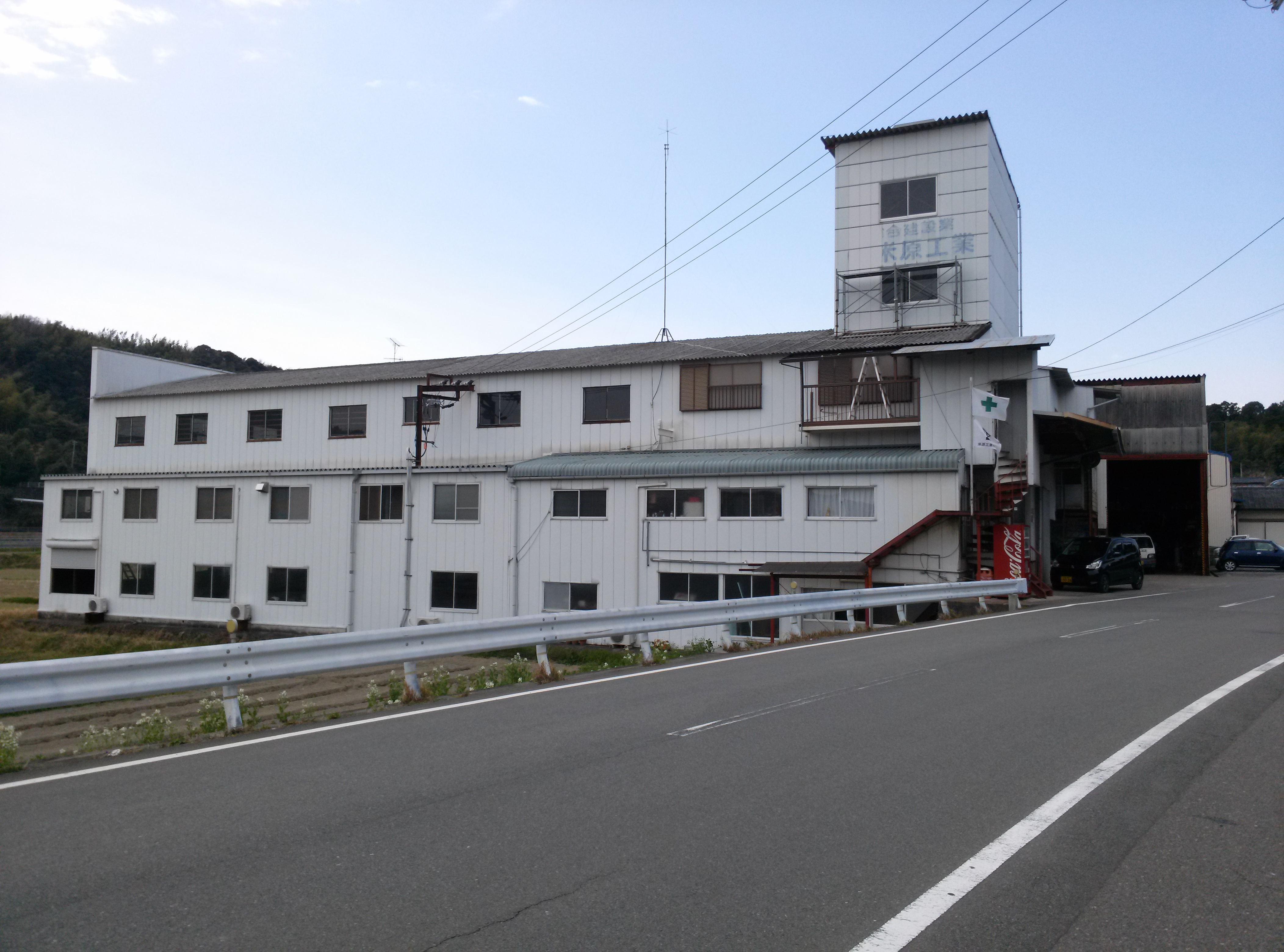 徳島県小松島市櫛淵町にある米原工業